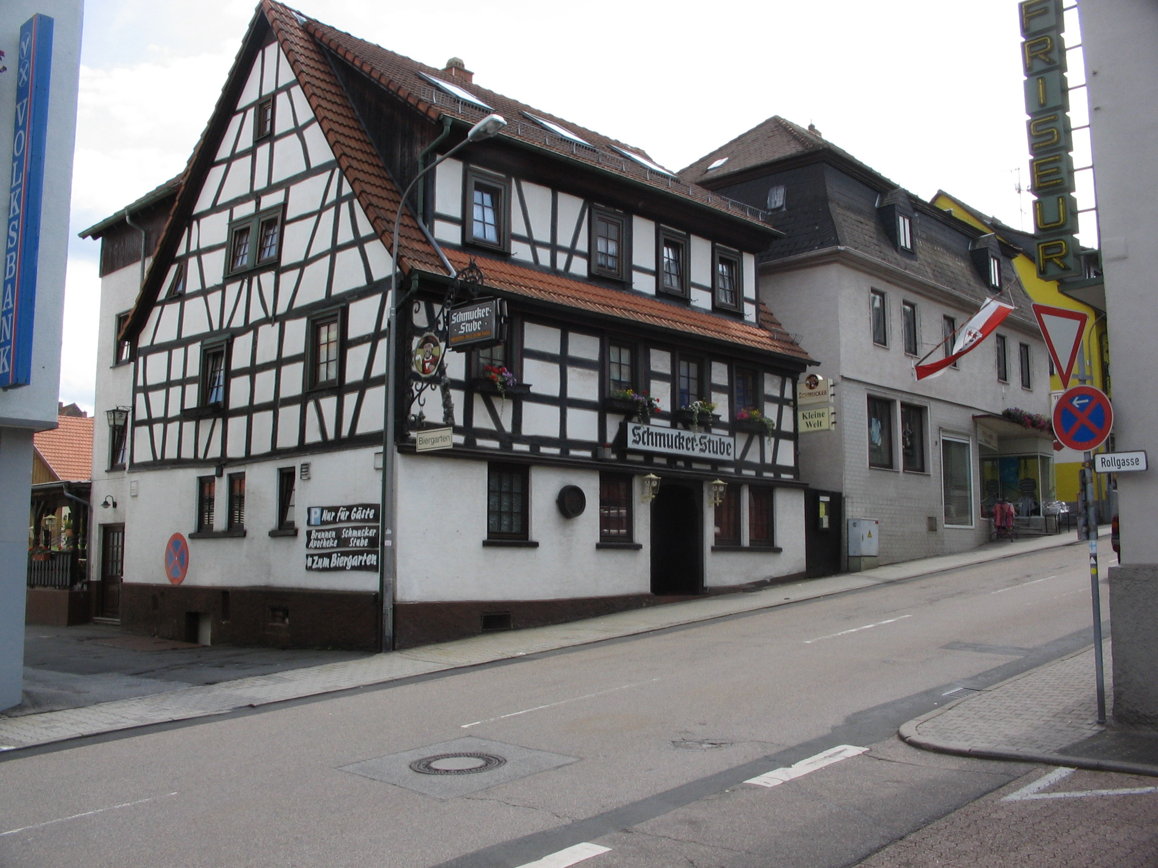 Fachwerkhaus in der Brunnengasse in Beerfelden.